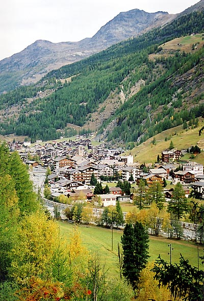 Blick auf Saas Grund